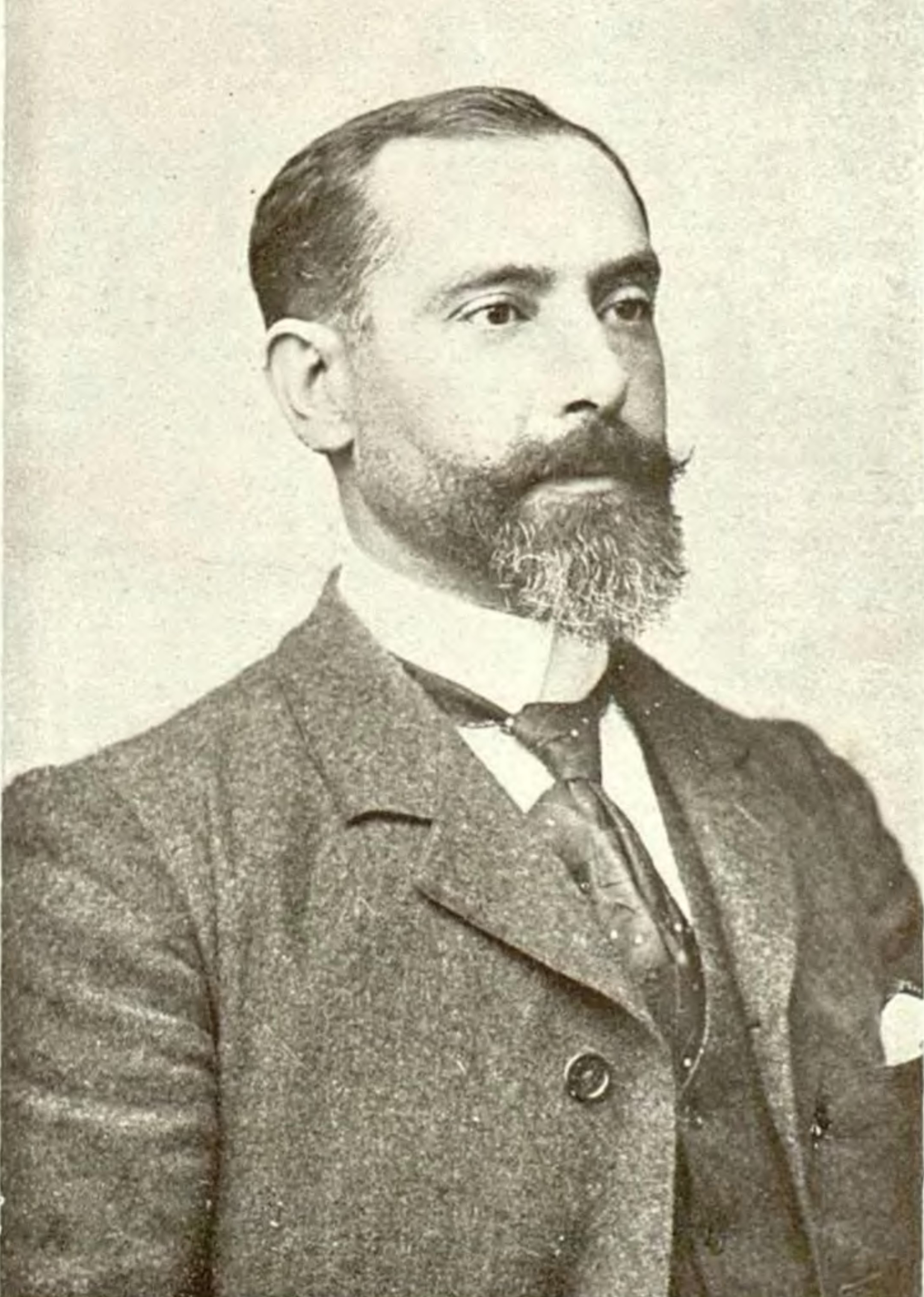 Sabin Aranaren argazkia, Olerkijak liburuaren barrualdetik aterata